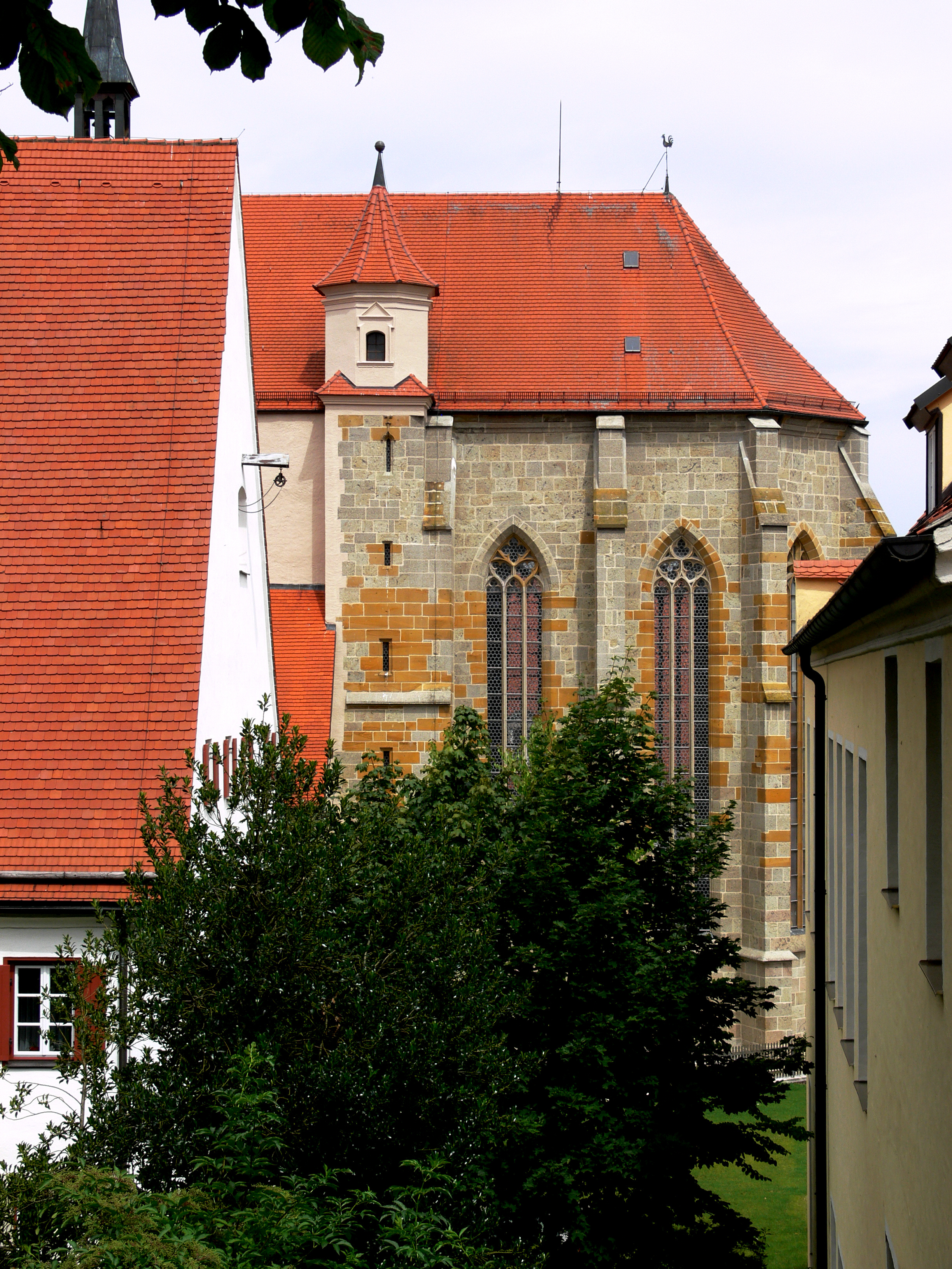 Nördlingen, Blick von der Stadtmauer Chor der St.-Salvator-Kirche